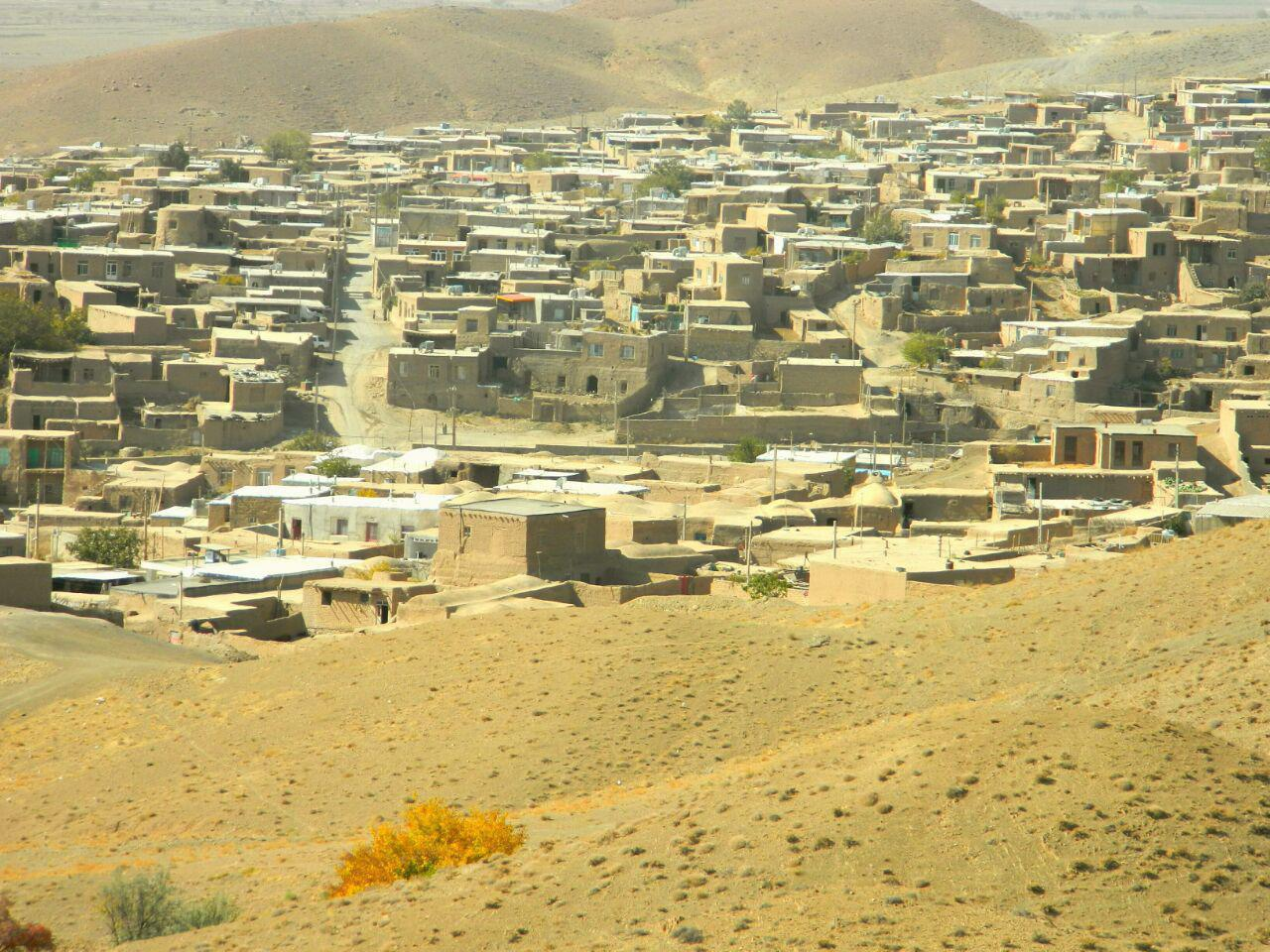 عکاس: علی سلیمانی (حسین اصغر)